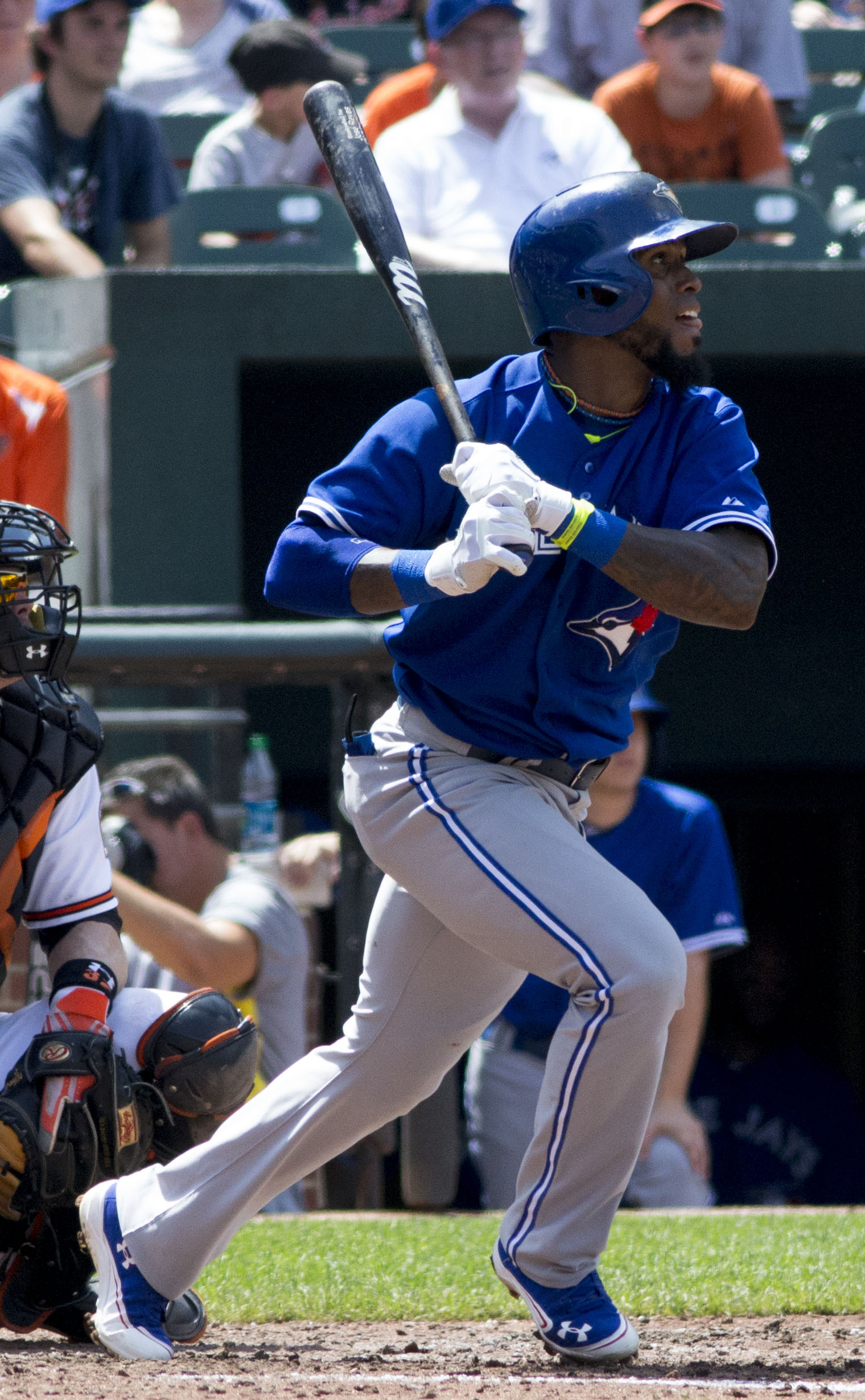 José Reyes